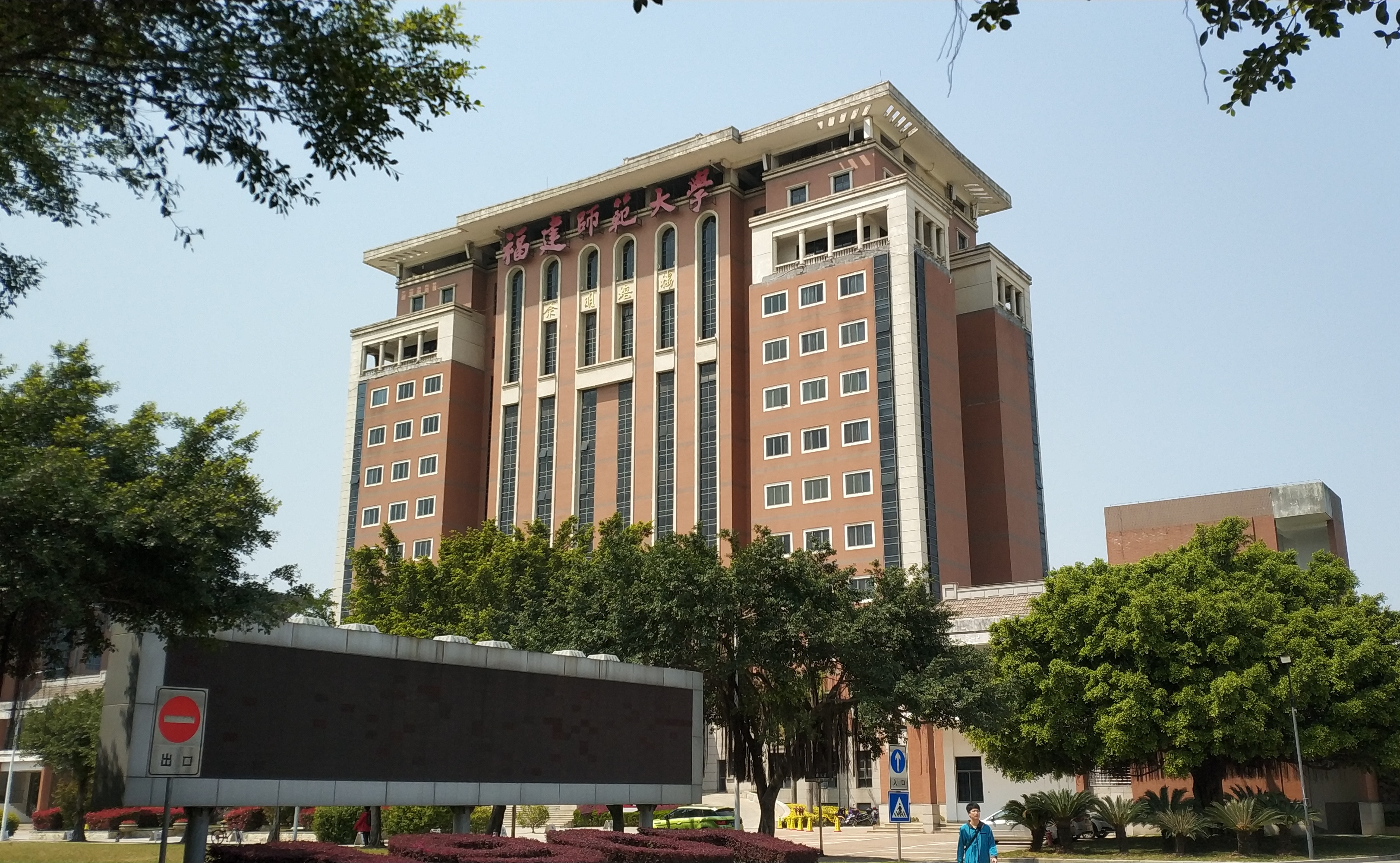 福建师范大学佘明培楼